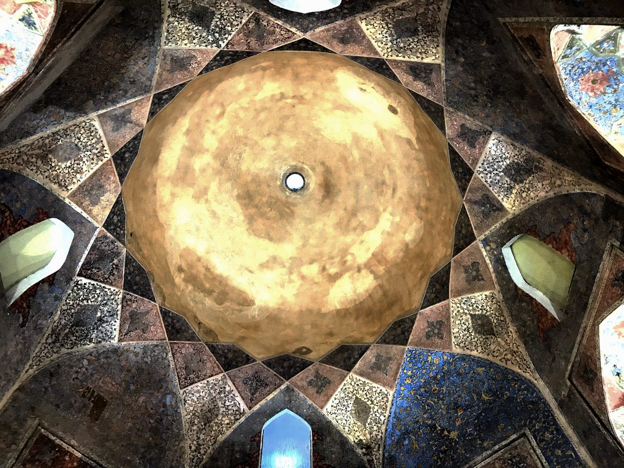 كاخ خورشيد در كلات نادري